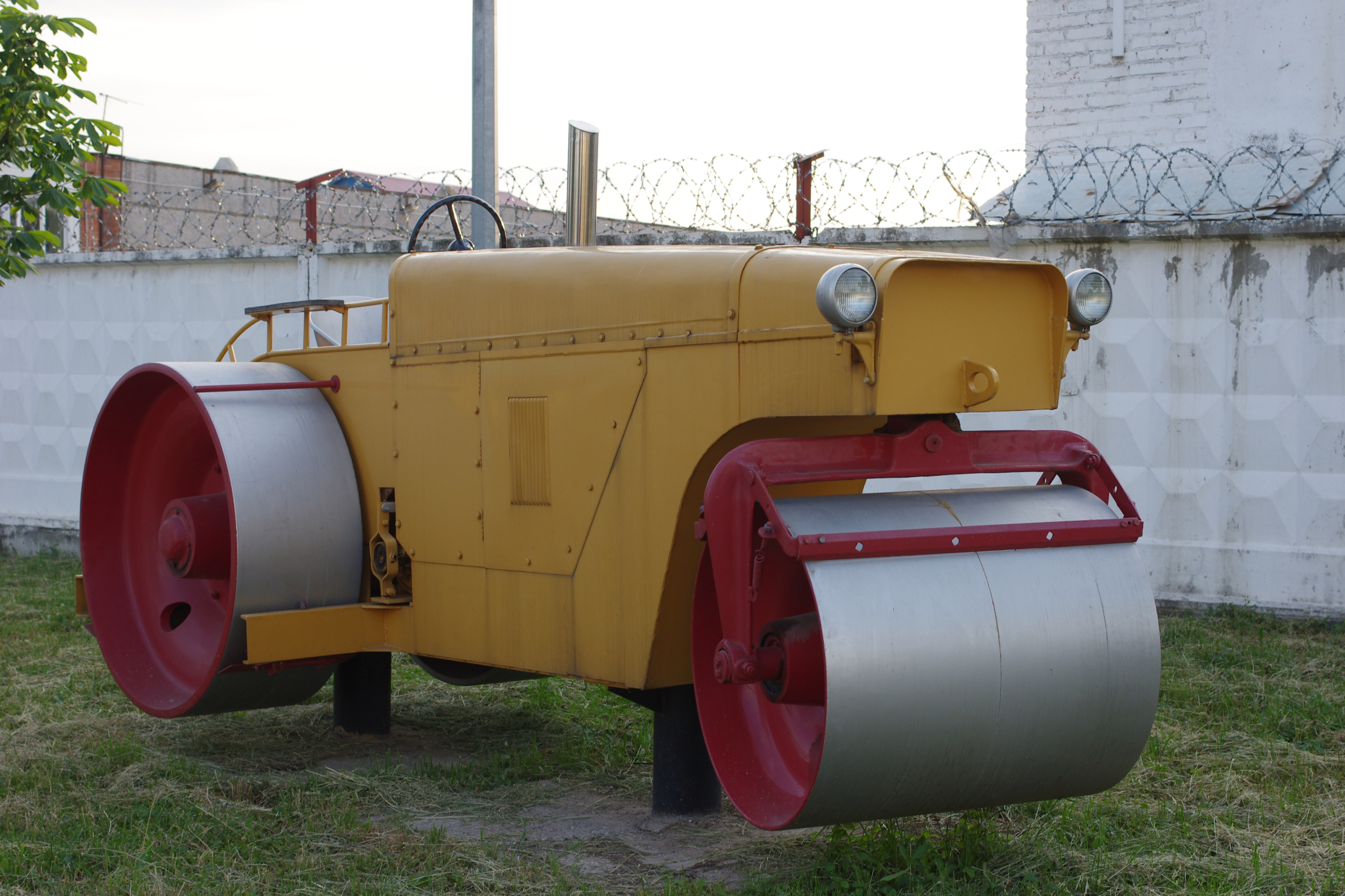 Раменское. Каток-памятник ДУ-50. См. координаты.